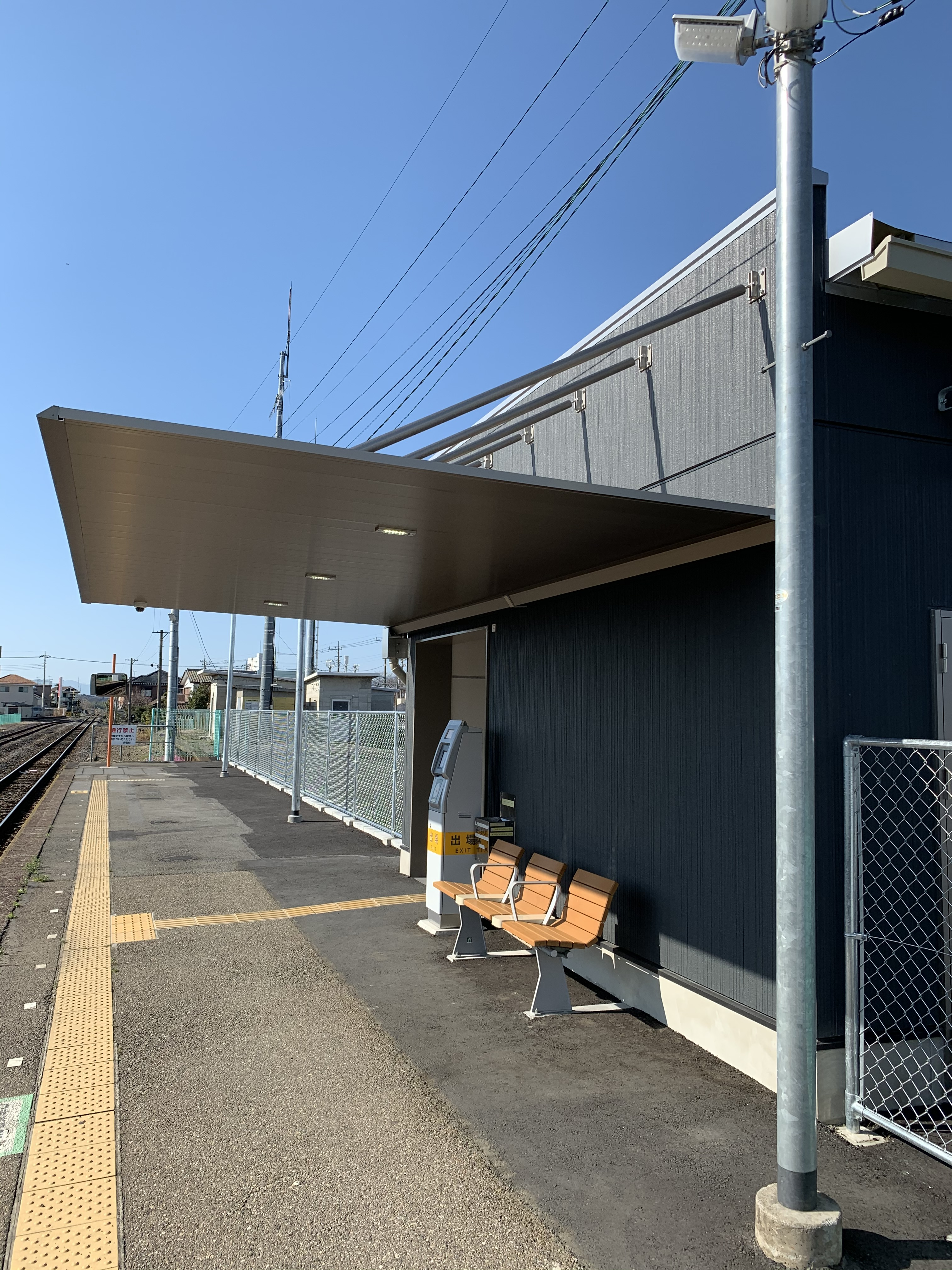 丹荘駅のホーム。